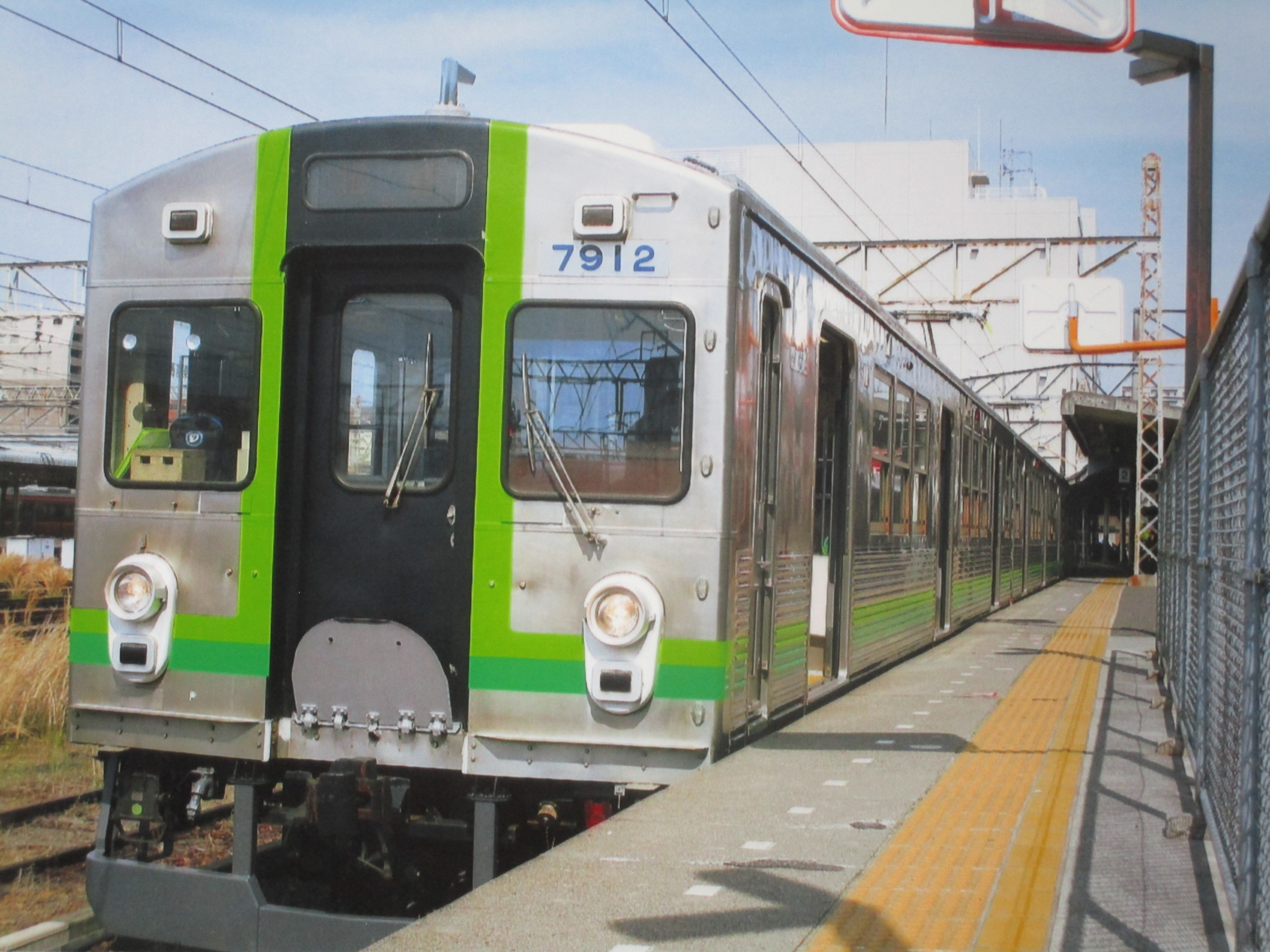 2018年に養老鉄道に譲渡された東急7700系車両